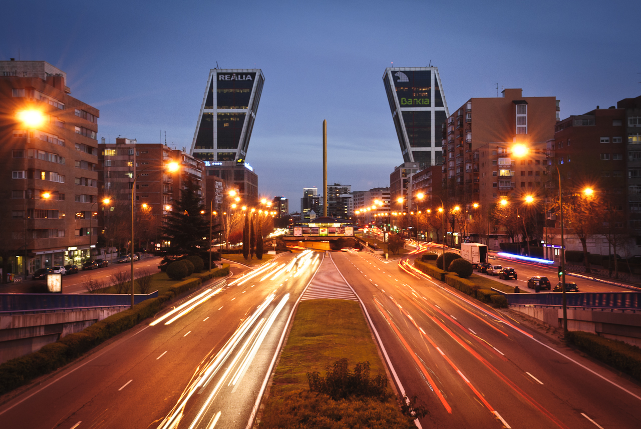 Foto nocturna imposible desde un puente que se movía muchísimo y pasando algo de vergüenza.